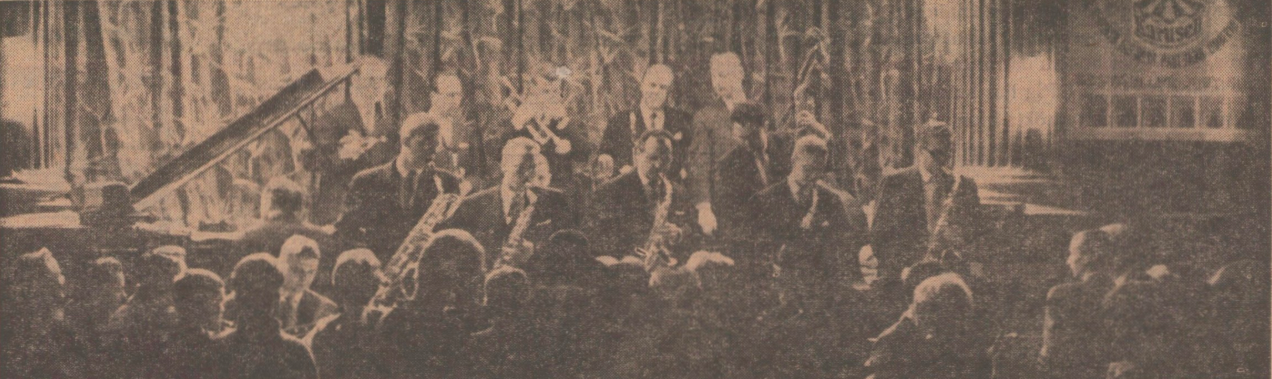 Arne Domnérus och Carl Henrik Norins orkestrar (Nalen, 18 januari 1961, publicerat 2 februari 1961).